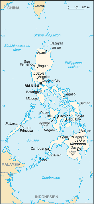 Karte der Philippinen, Übersetzung: Benutzer:Pit